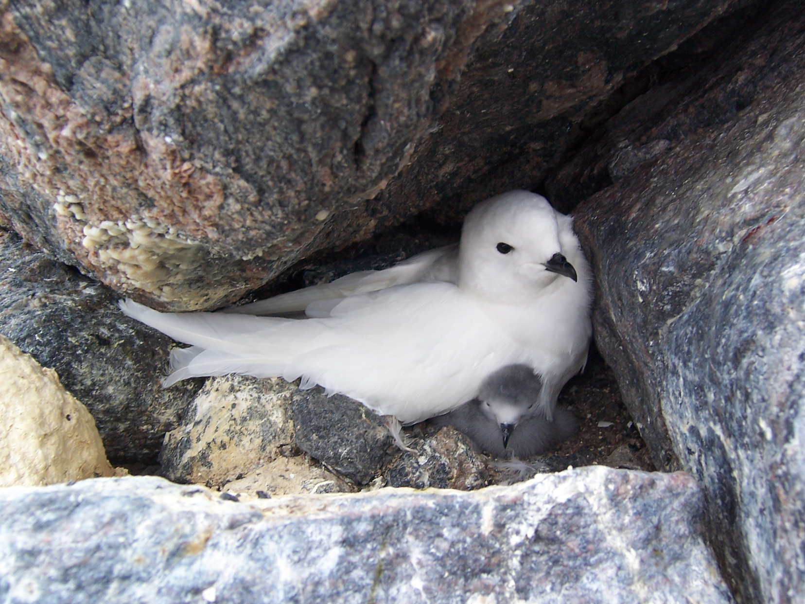 Pétrel des neiges (Pagodroma nivea) photographié dans son nid avec un poussin, site de la base Française Dumont d'Urville, Terre Adélie, Antarctique